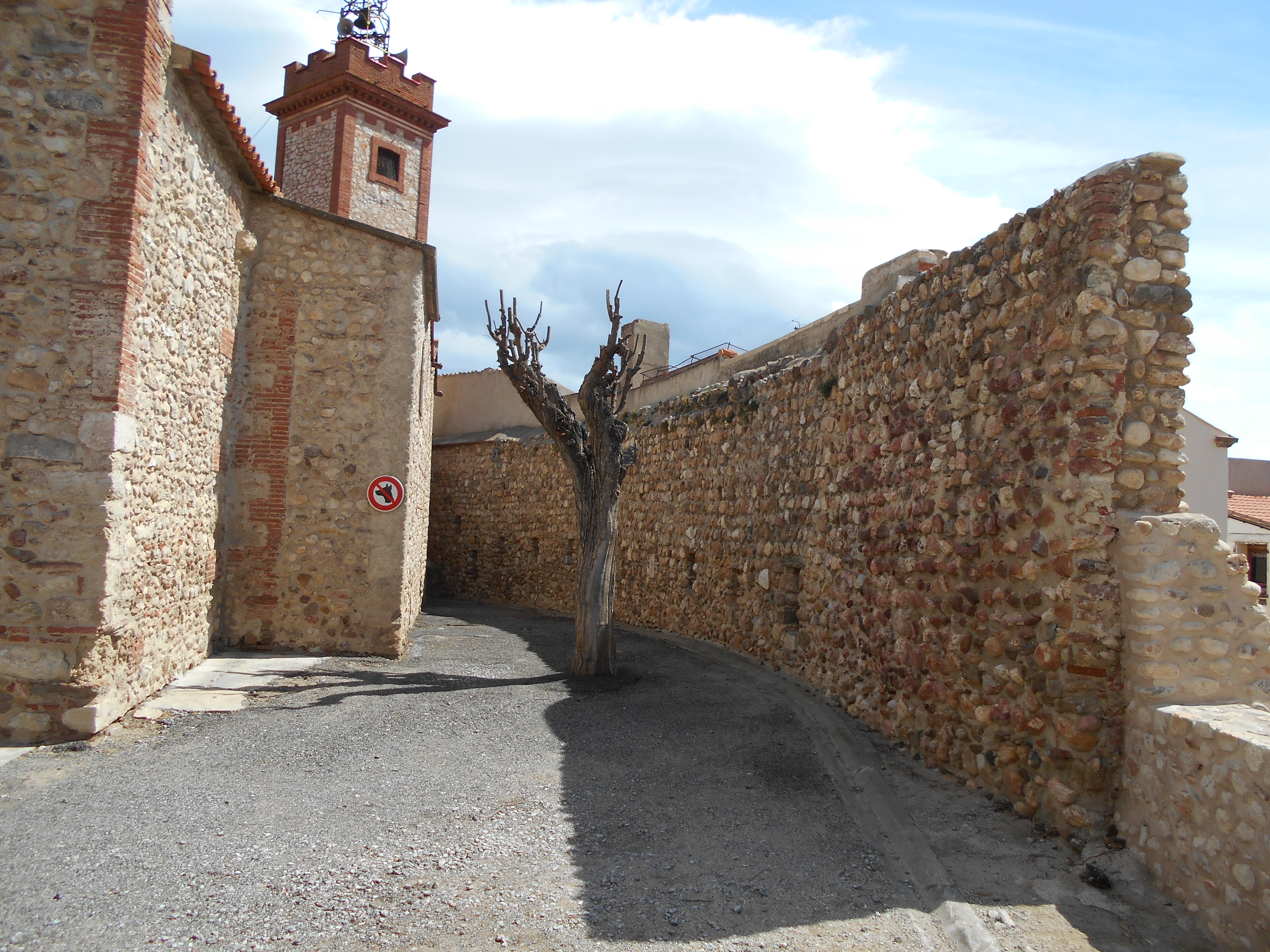 Les muralles 3